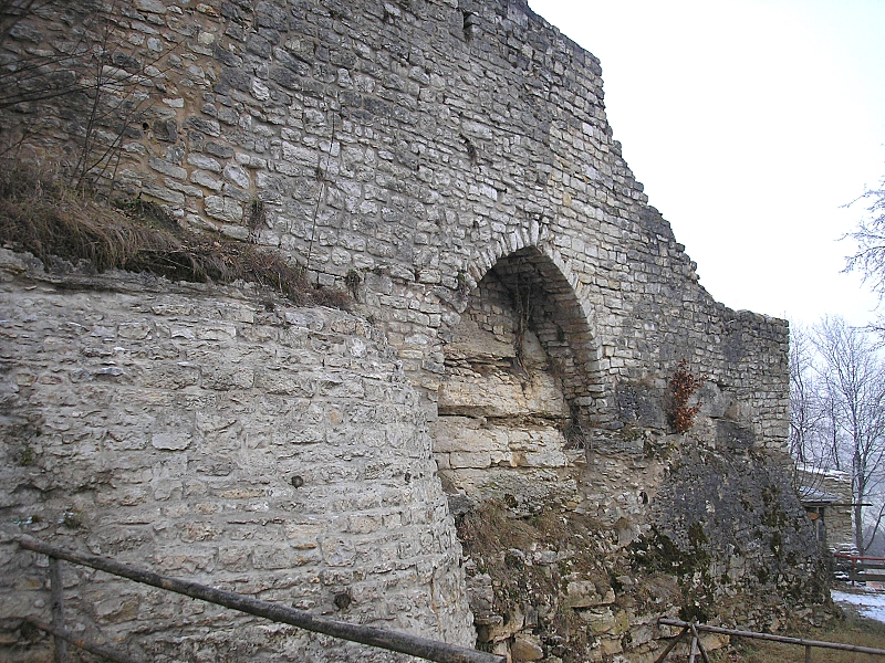 Burg Treuchtlingen (Obere Burg, Landkreis Weißenburg-Gunzenhausen, Mittelfranken). Die Südseite der Hauptburg nach Osten. Eigene Aufnahme, Dez. 2007 / Treuchtlingen castle (Upper castle, Middle Franconia, Bavaria, Germany). Southern part of the central castle, looking east. Own photo, Dec. 2007